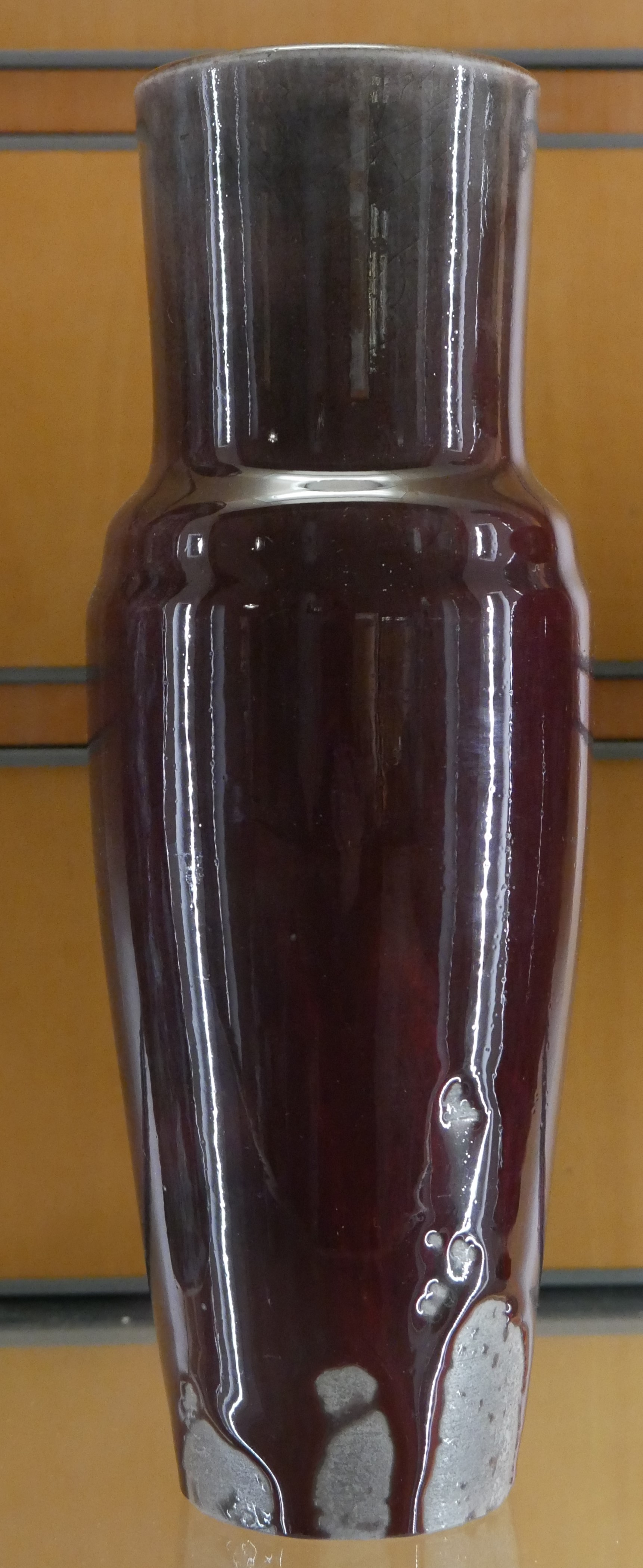 Porcelaine - Grès Achat auprès d'Achille Astre, 1921